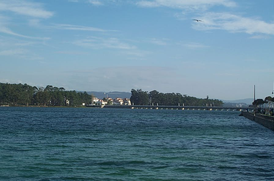 Illa da Toxa vista desde O Grove